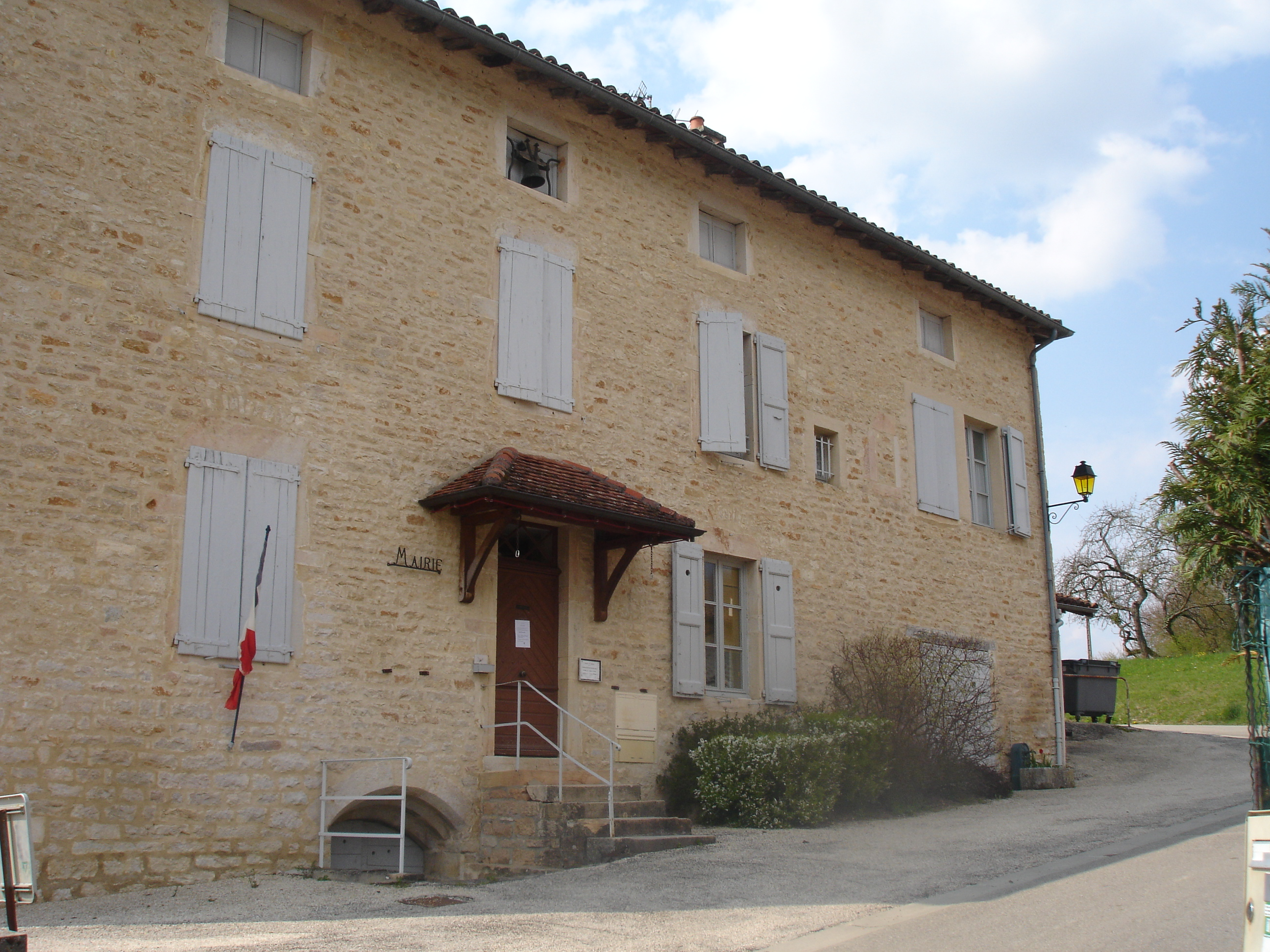 Verjon (Ain) : la mairie